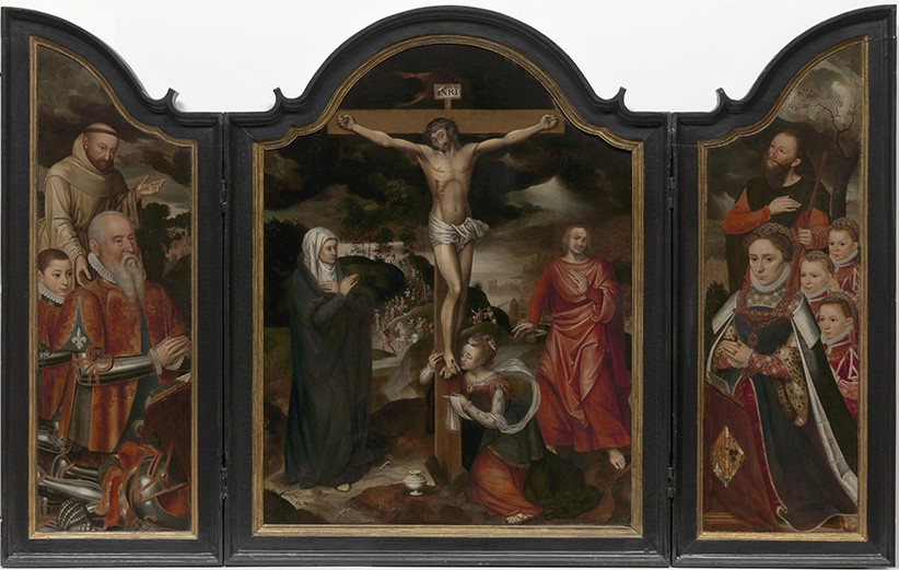 Christus aan het kruis met Maria, Johannes en Maria Magdalena (Pieter I Claeissens, circa 1567); collection: Musea Brugge - Groeningemuseum